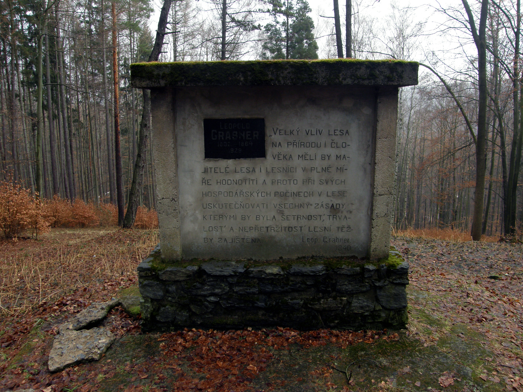 Památník Leopolda Grabnera v Moravském krasu